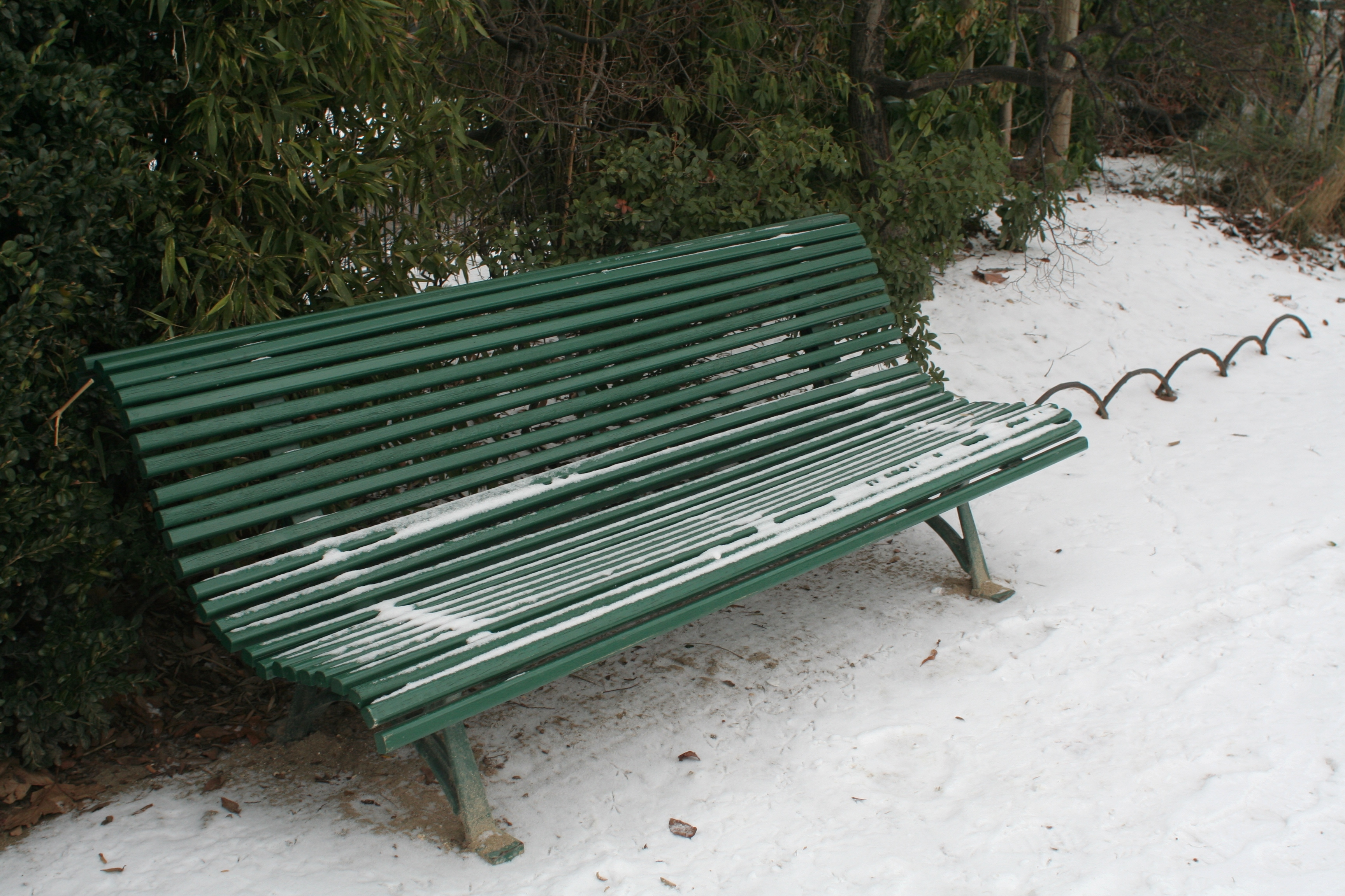 Banc sous la neige, square Claude-Nicolas-Ledoux à Paris (France).